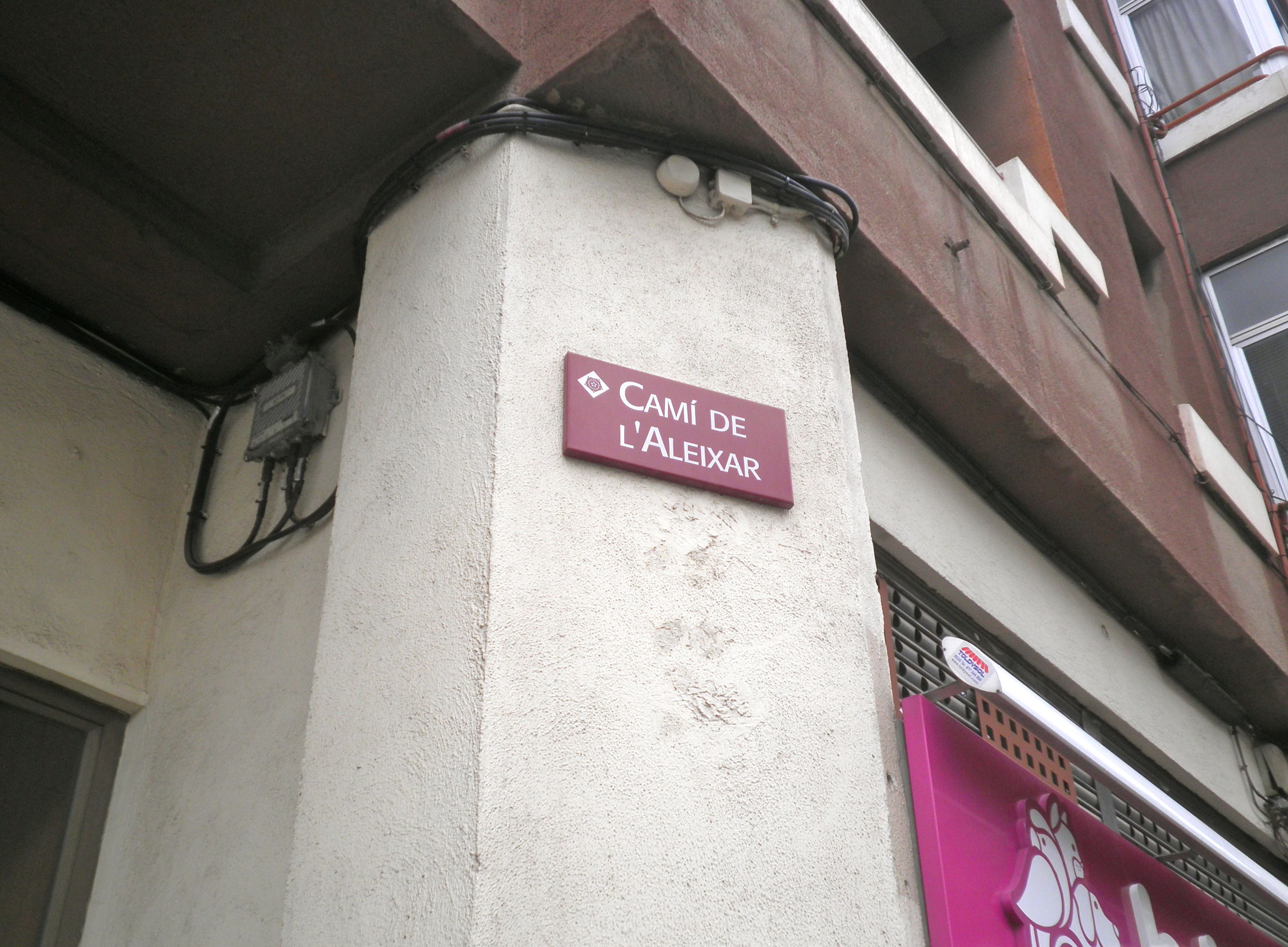 El camí de l'Aleixar a l'alçada de la carretera d'Alcolea